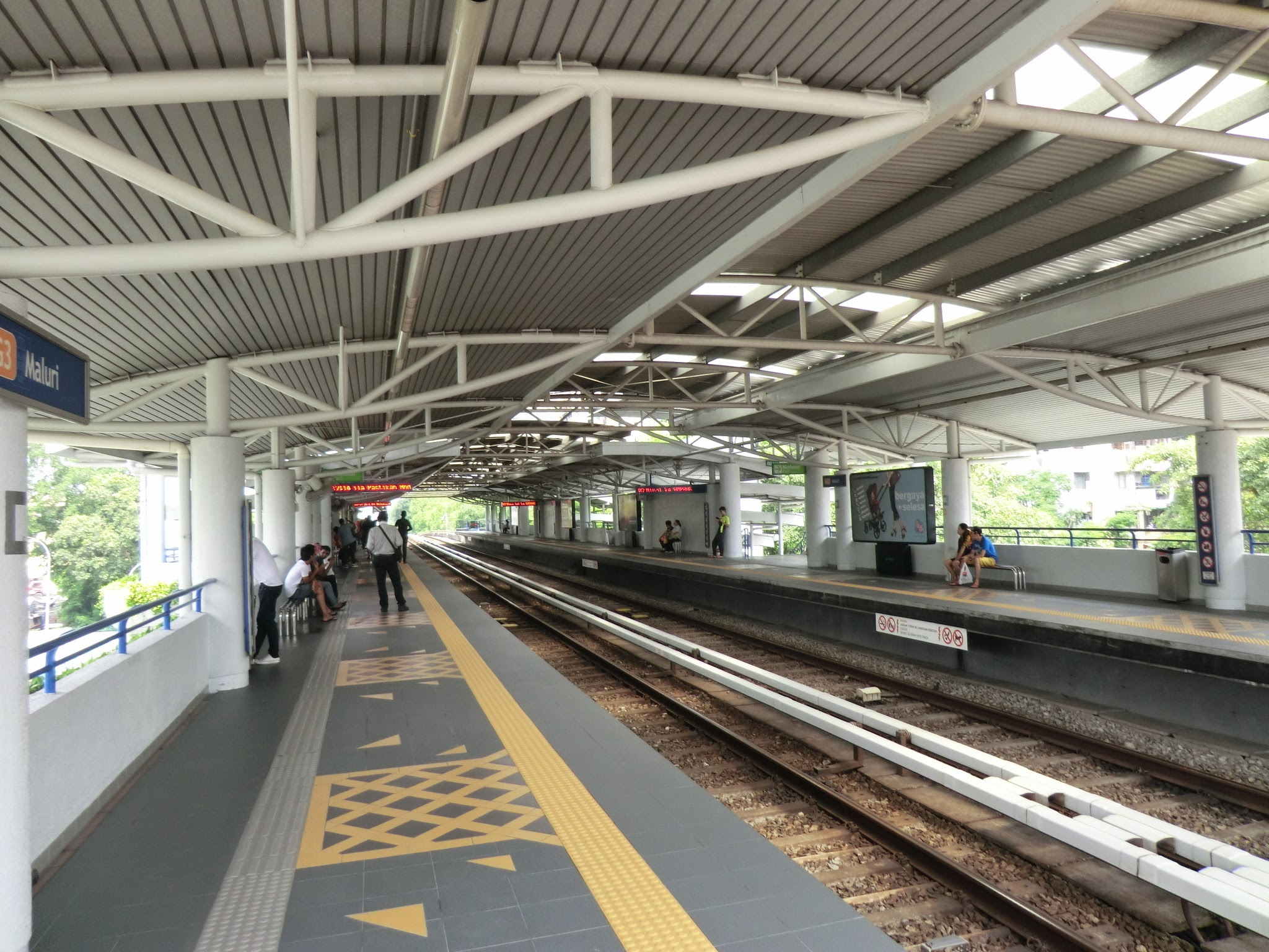 Maluri, Kuala Lumpur, Federal Territory of Kuala Lumpur, Malaysia